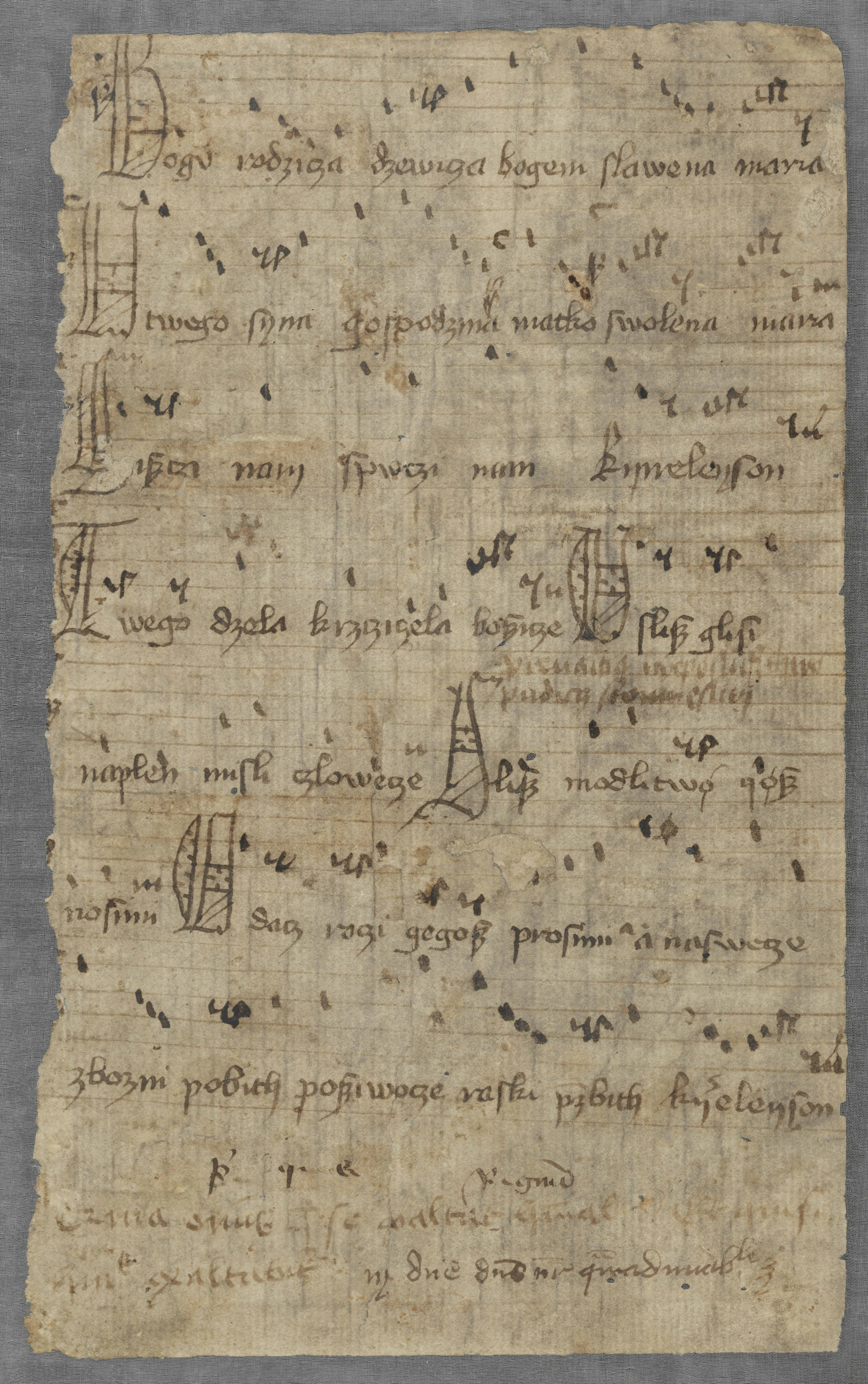 Najstarszy znany zapis tekstu Bogurodzicy z 1407 zapisany na tylnej wyklejce zbioru kazań łacińskich skopiowanych przez wikarego w Kcyni na Pałukach Macieja z Grochowa